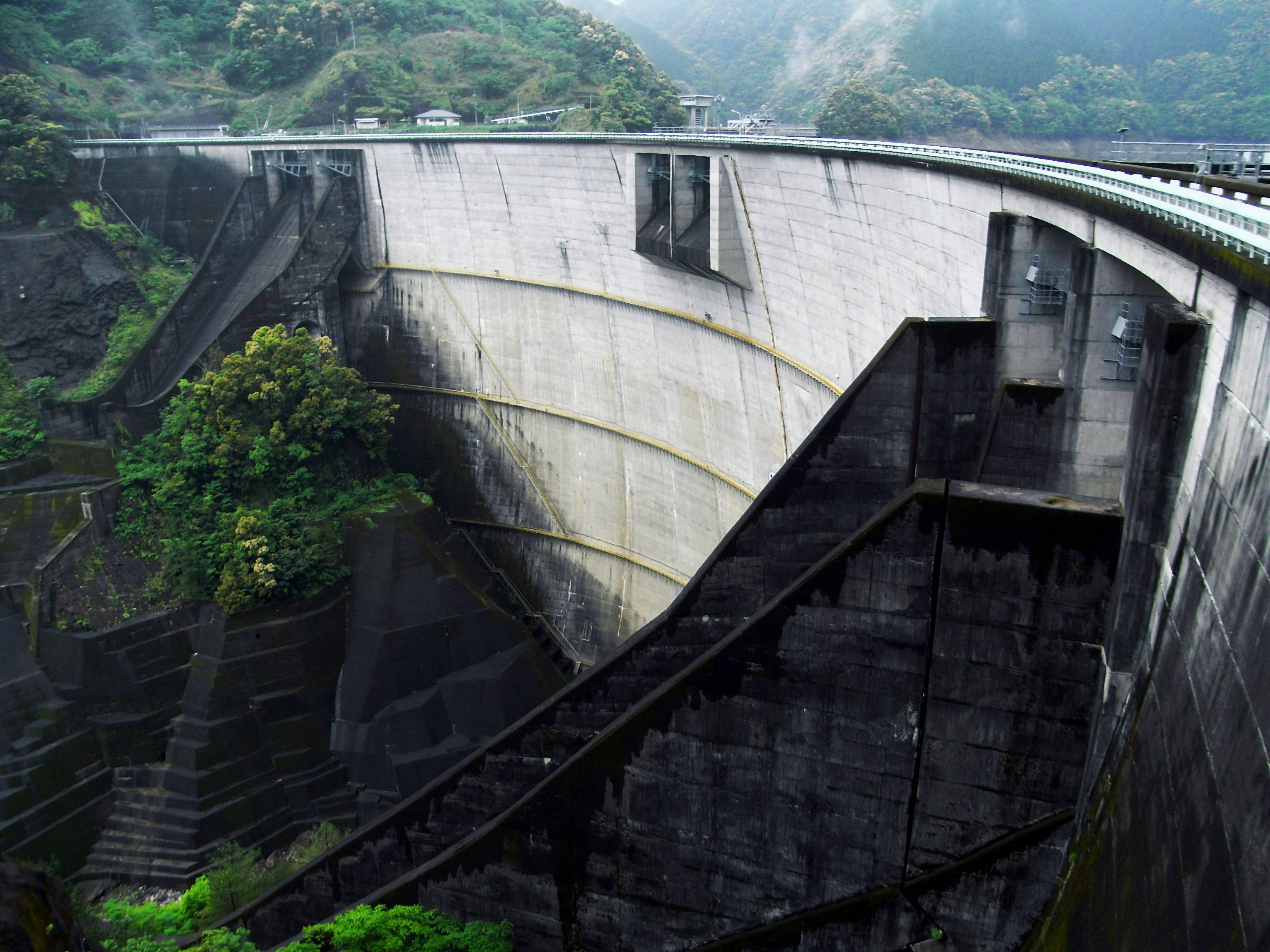 Dam